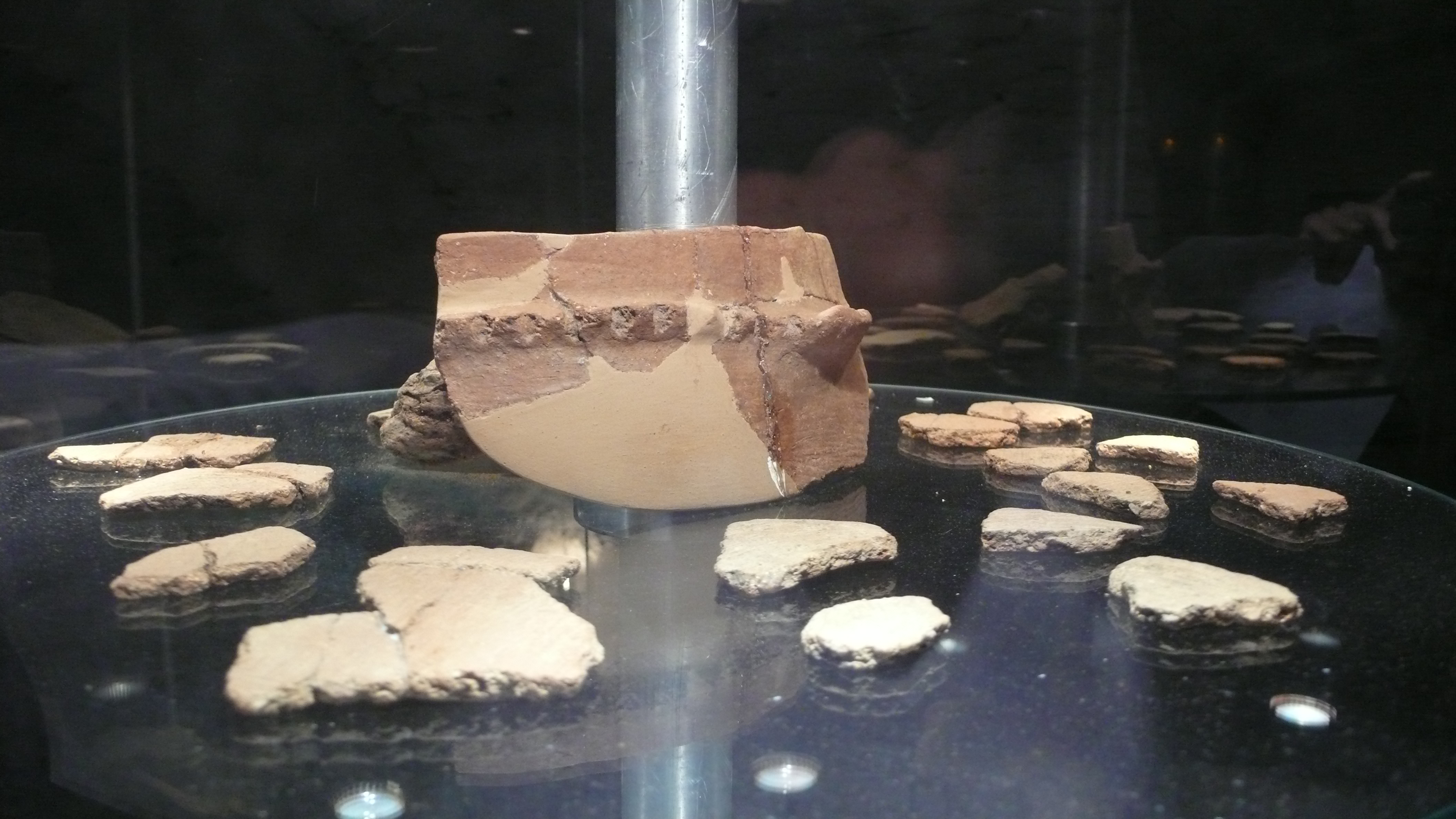 Nádoba z eneolitu nalezená u obce Jetětice